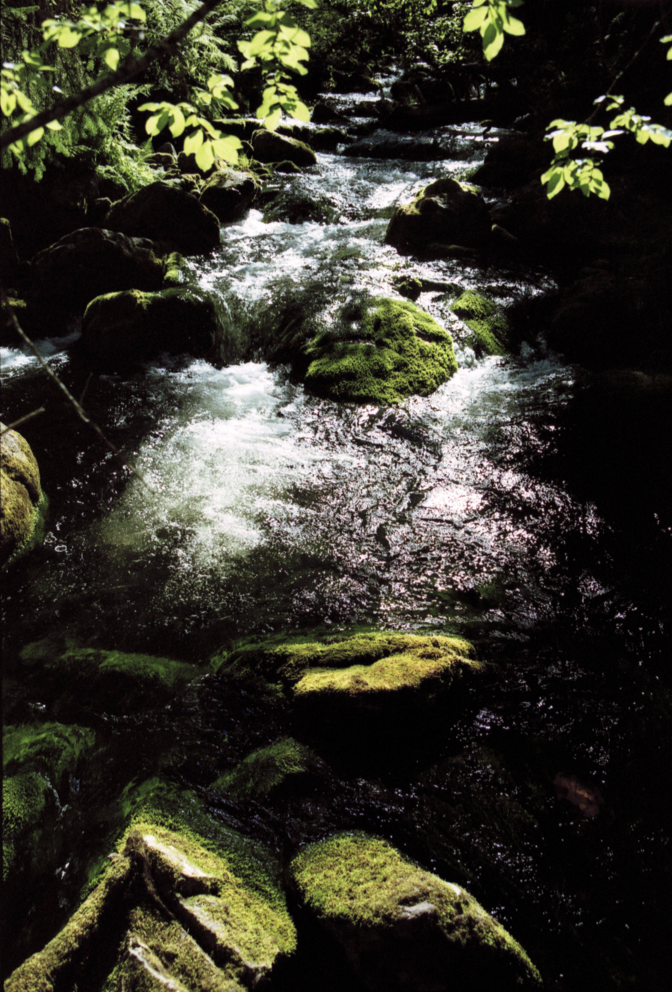 Bäcken nedanför vattenfallet Njupeskär i Dalarna.